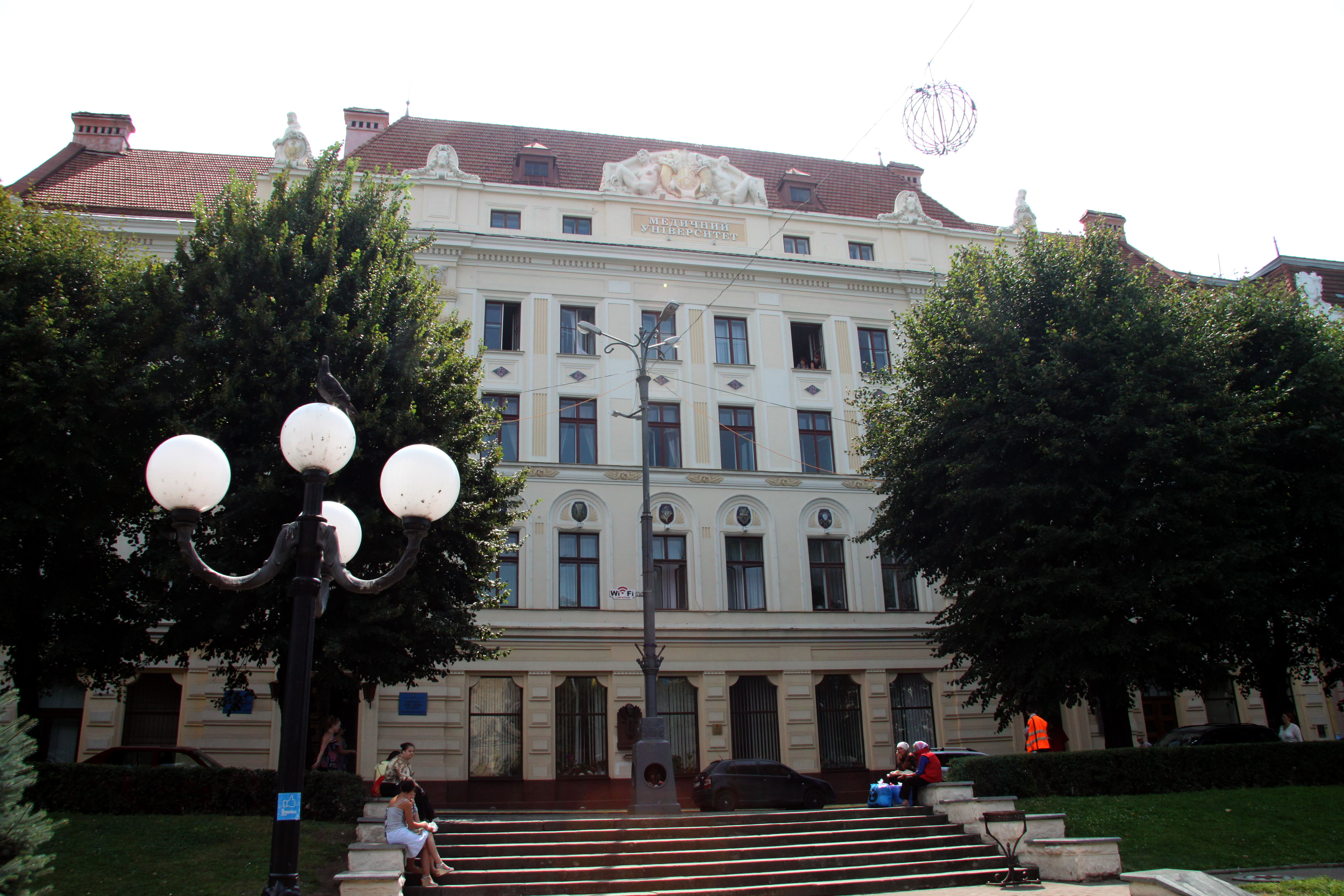 Палата буковинських ремесел (арх. Ф. Готтесман), пл. Театральна, 2, Чернівці